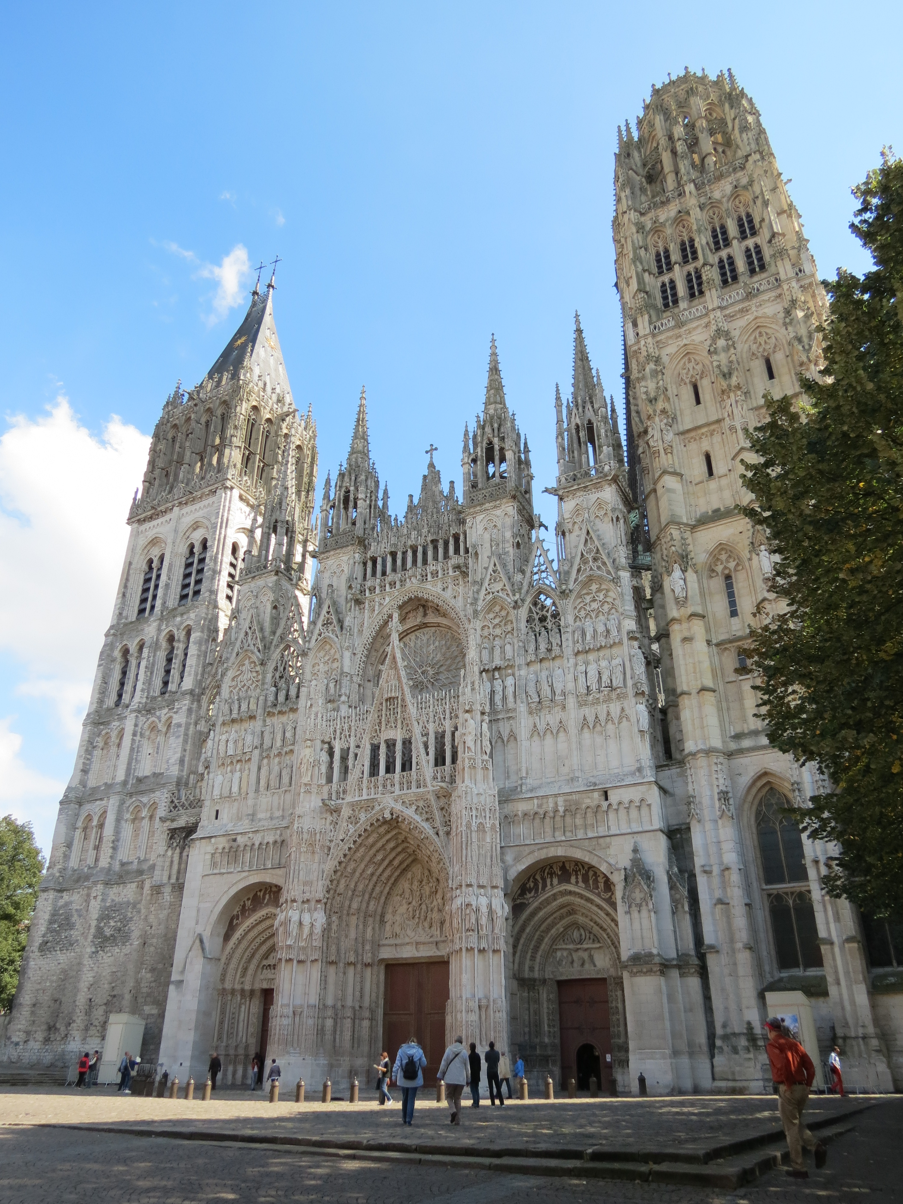 Façade occidentale de la cathédrale de Rouen